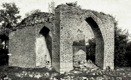 Quba_rayonu_Ağbil_kəndində_portikli_türbə